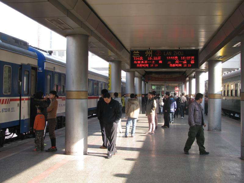 200901 张掖